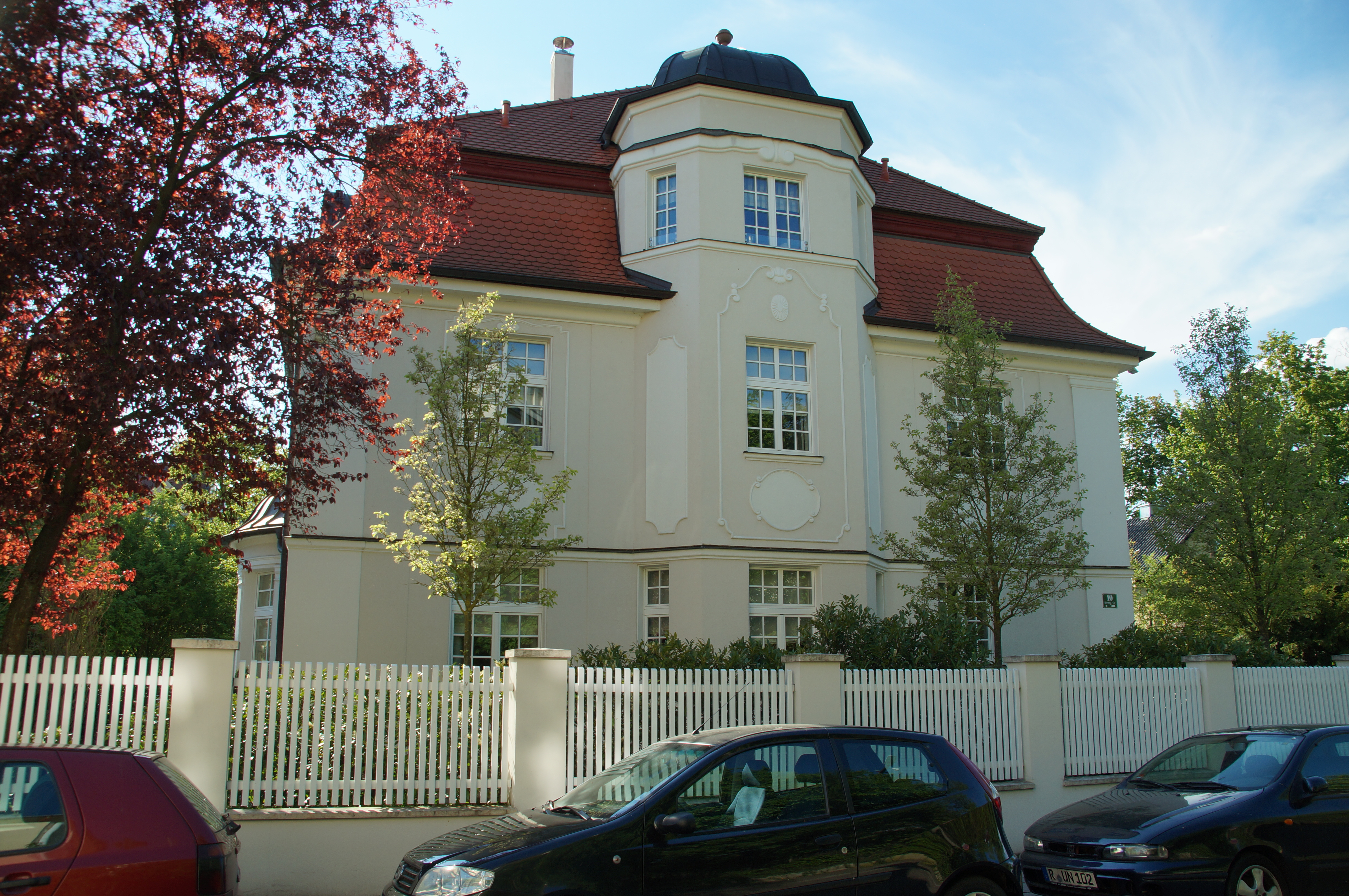 Villa, zweigeschossiger Mansardwalmdachbau mit Zwerchgiebel und Erkerturm mit Welscher Haube, später Jugendstil, 1915 von Heinrich Hauberrisser (1920-45 Wohnsitz Hauberrissers) This is a photograph of an architectural monument.